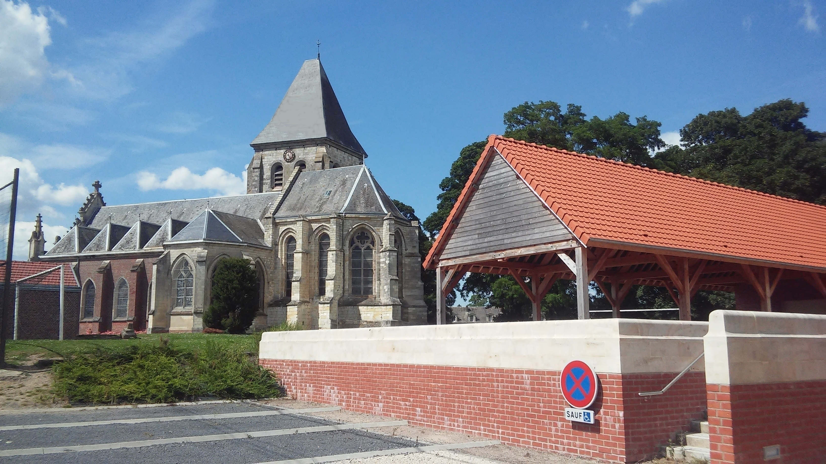 Photographie de l'église de Framerville